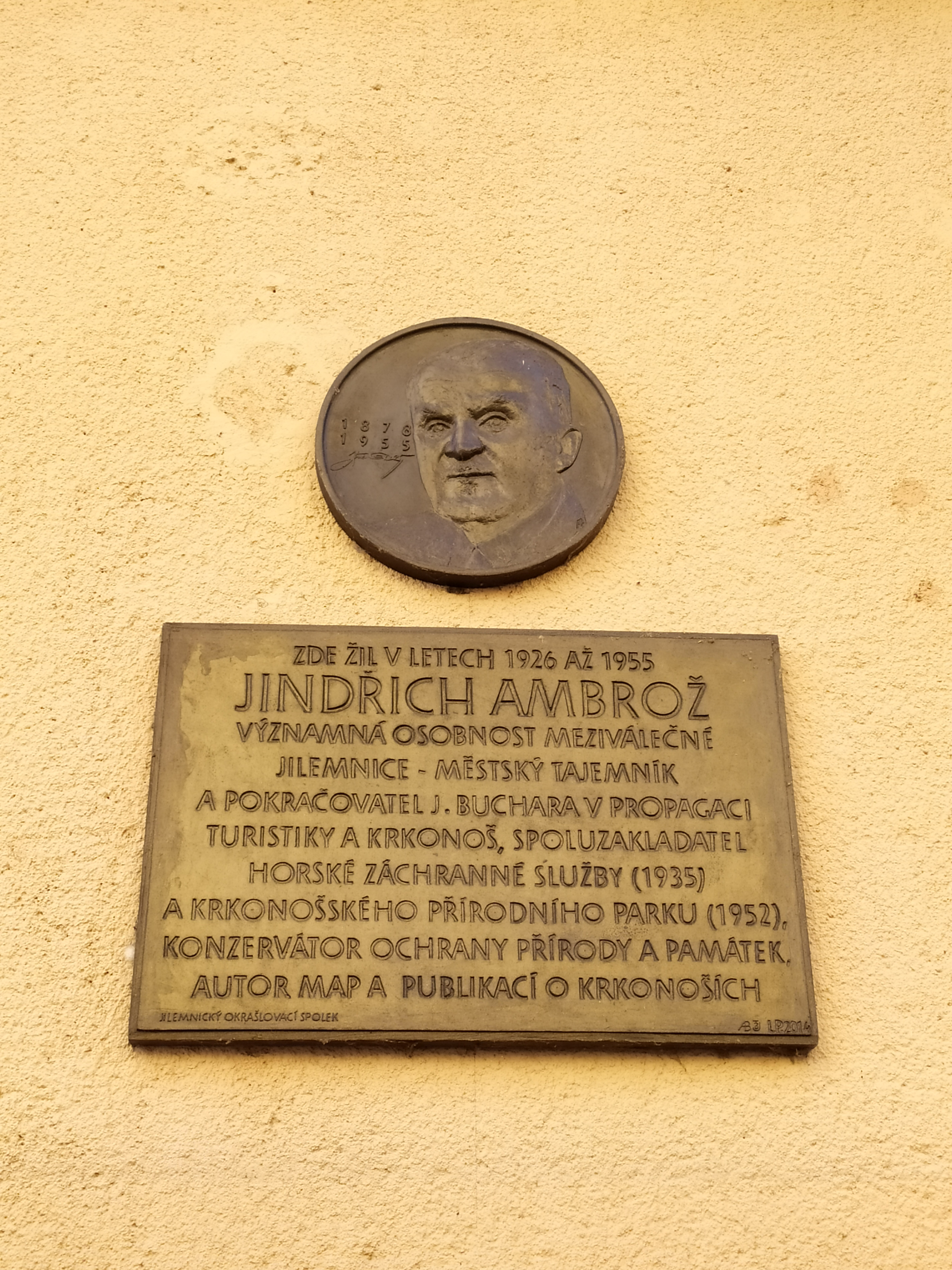 Pamětní deska Jindřicha Ambrože na domu č. p. 162 v Jilemnici